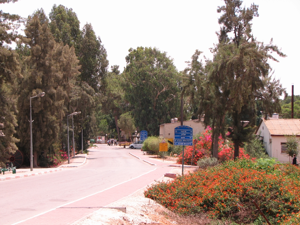 קיבוץ בארות יצחק